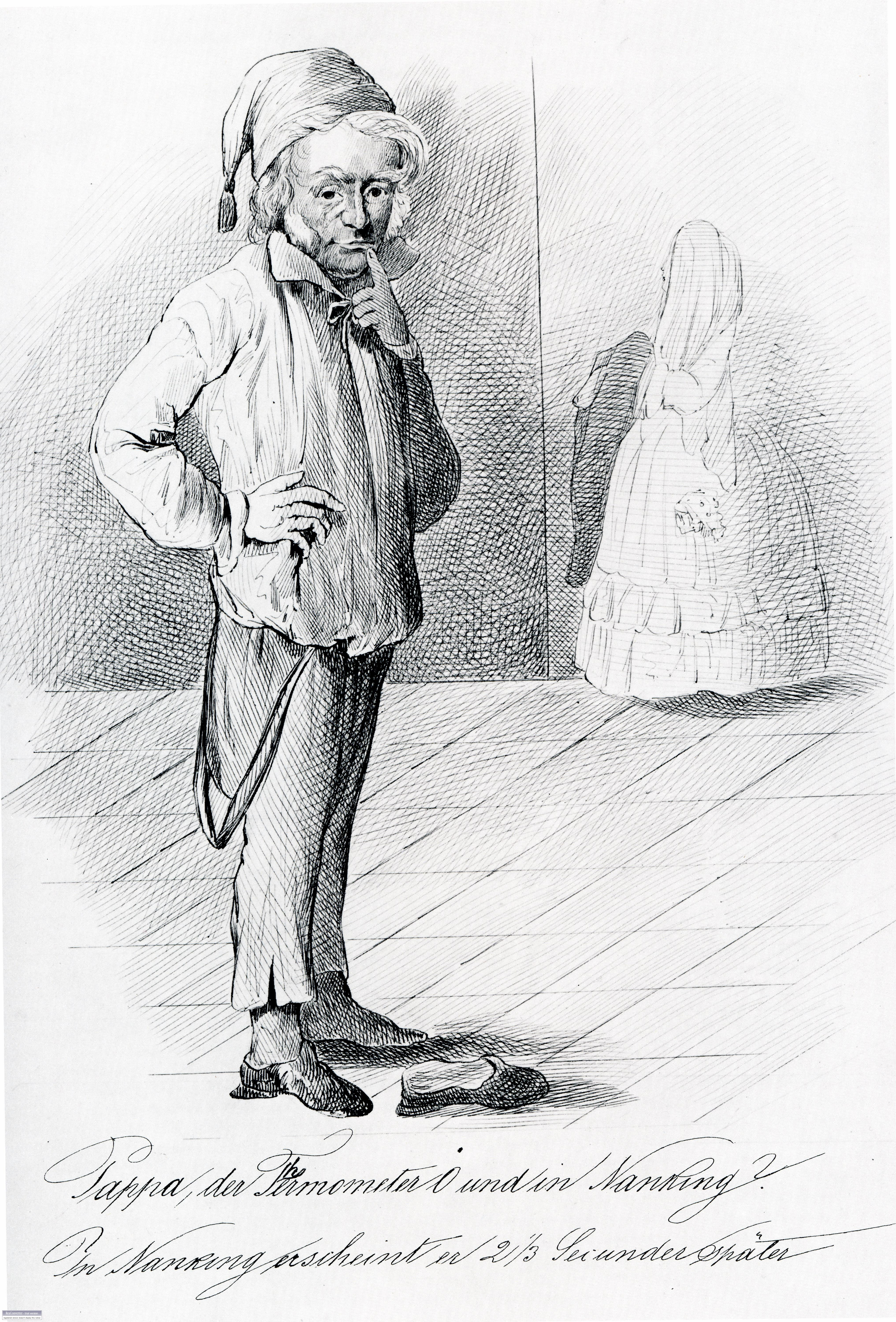 Karikatur von Carl Friedrich Gauß und seiner Tocher Therese Staufenau geb. Gauß (?), Federzeichnung von Friedrich Eduard Ritmüller, 21,7 x 20,0 cm, 1830er Jahre (?), Kunstgeschichtliches Seminar und Kunstsammlung der Universität Göttingen.